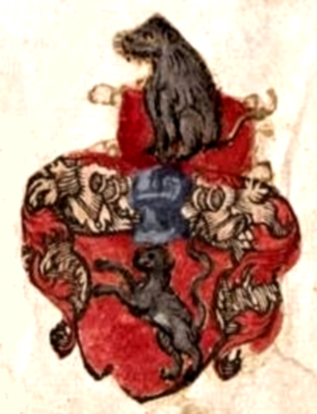 Wappen der Familie Katzmair, einer wohlhabenden Münchner Patrizierfamilie (1318—1533)